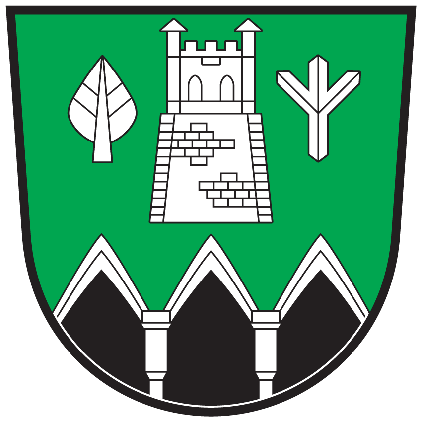 Wappen von Frantschach-Sankt Gertrau